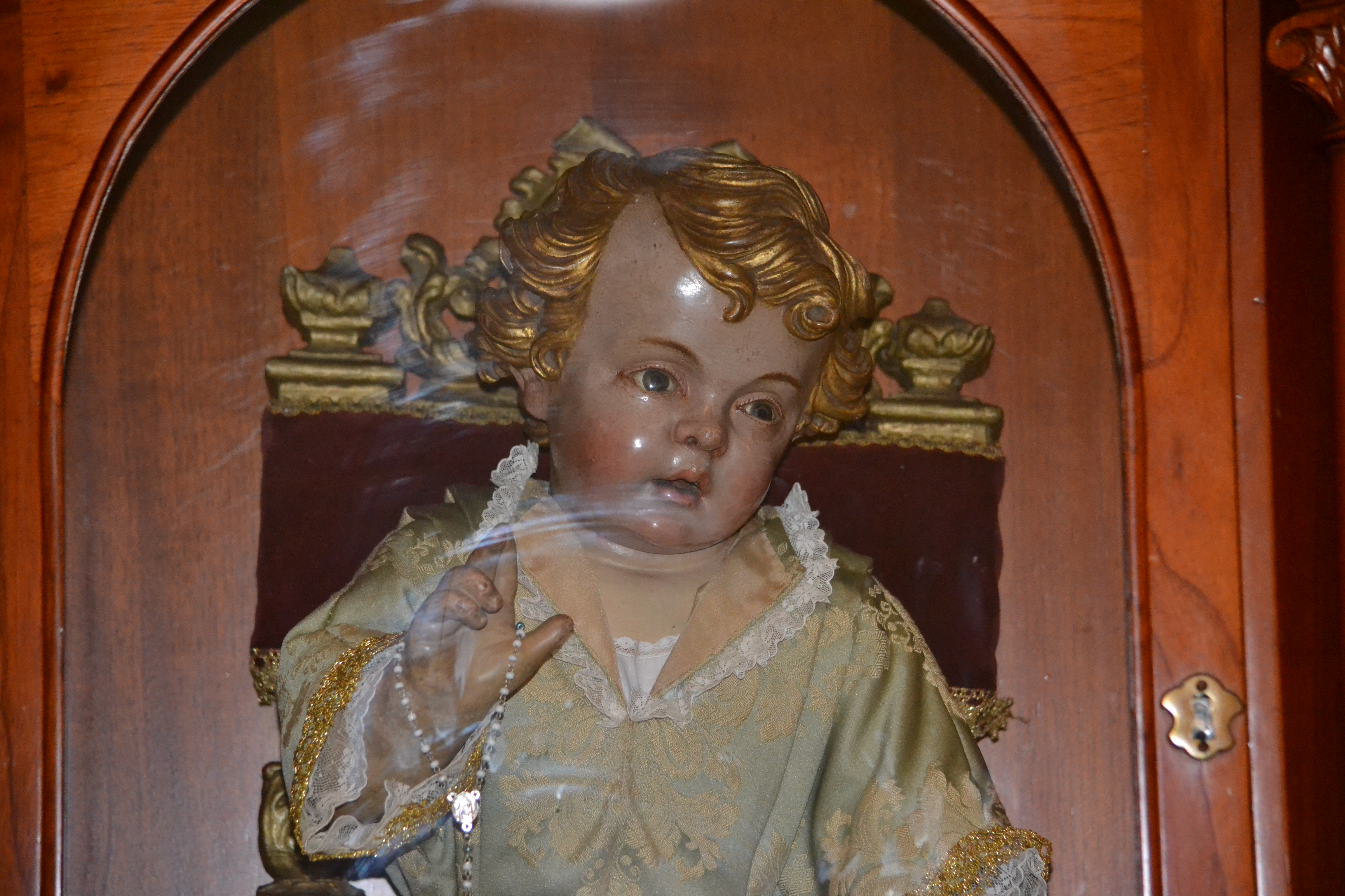 Colección Cristo de La Laguna by elduendesuarez